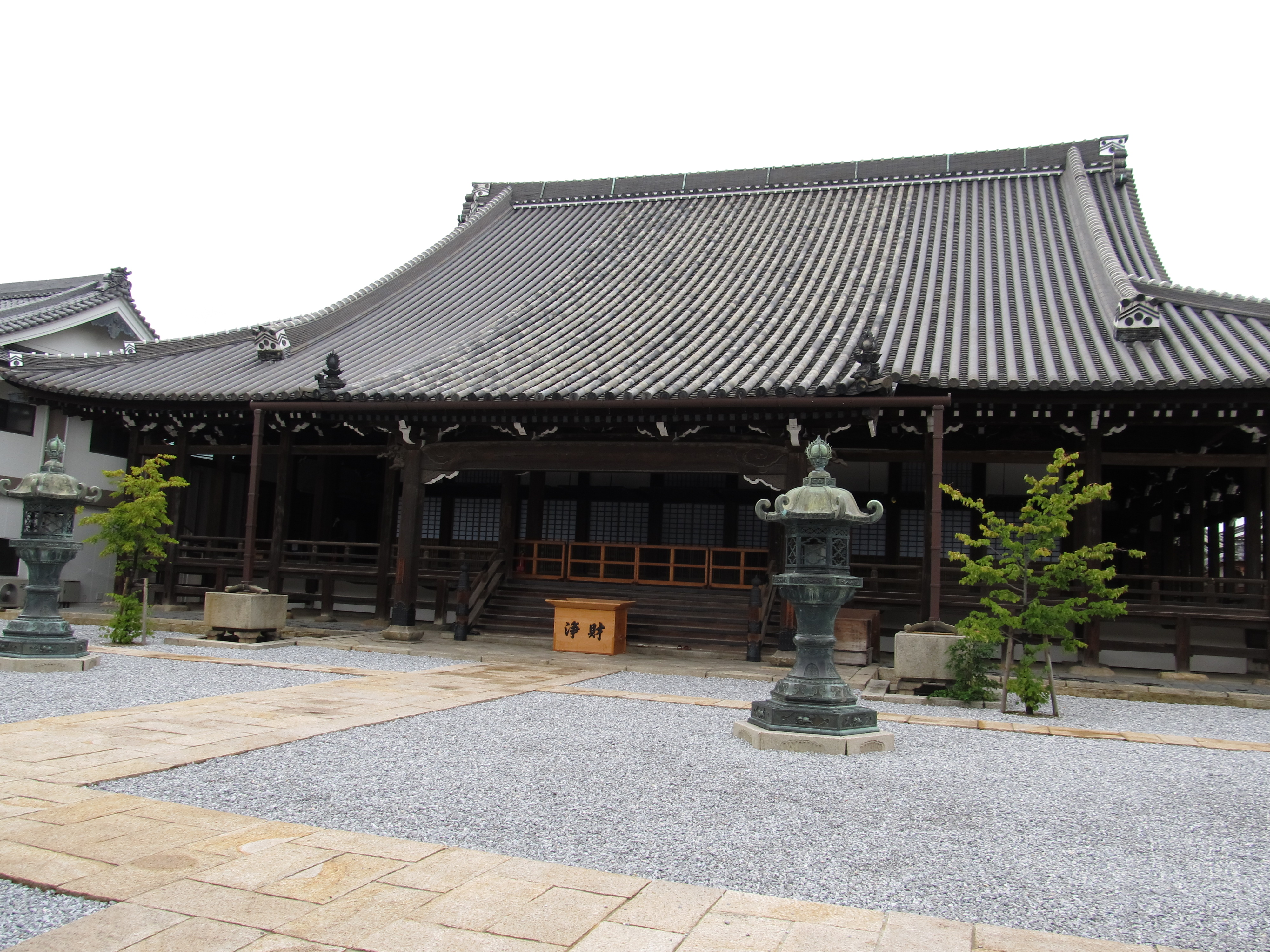 大阪府貝塚市にある浄土真宗本願寺派の寺院、願泉寺の本堂。願泉寺は天正11年（西暦1583年）から約2年間、本願寺十一世顕如が滞在し、本願寺の拠点となった。